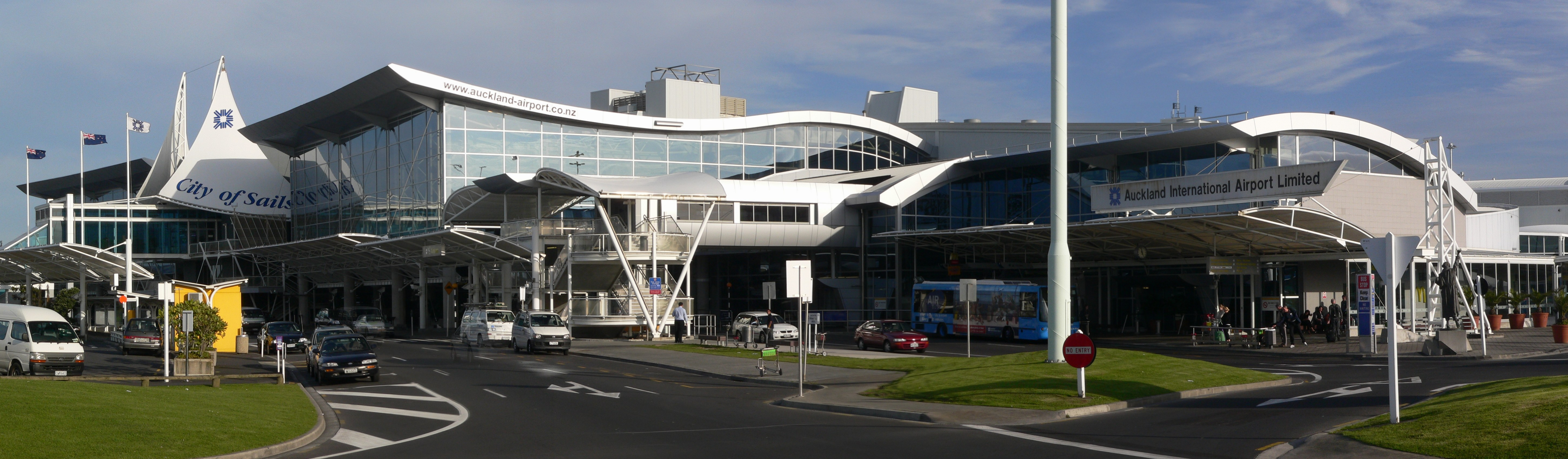 Terminal International del Aeropuerto Internacional de Auckland The international terminal at Auckland International Airport, New Zealand. Photograph taken by Lee Kindness, 30/09/2005.